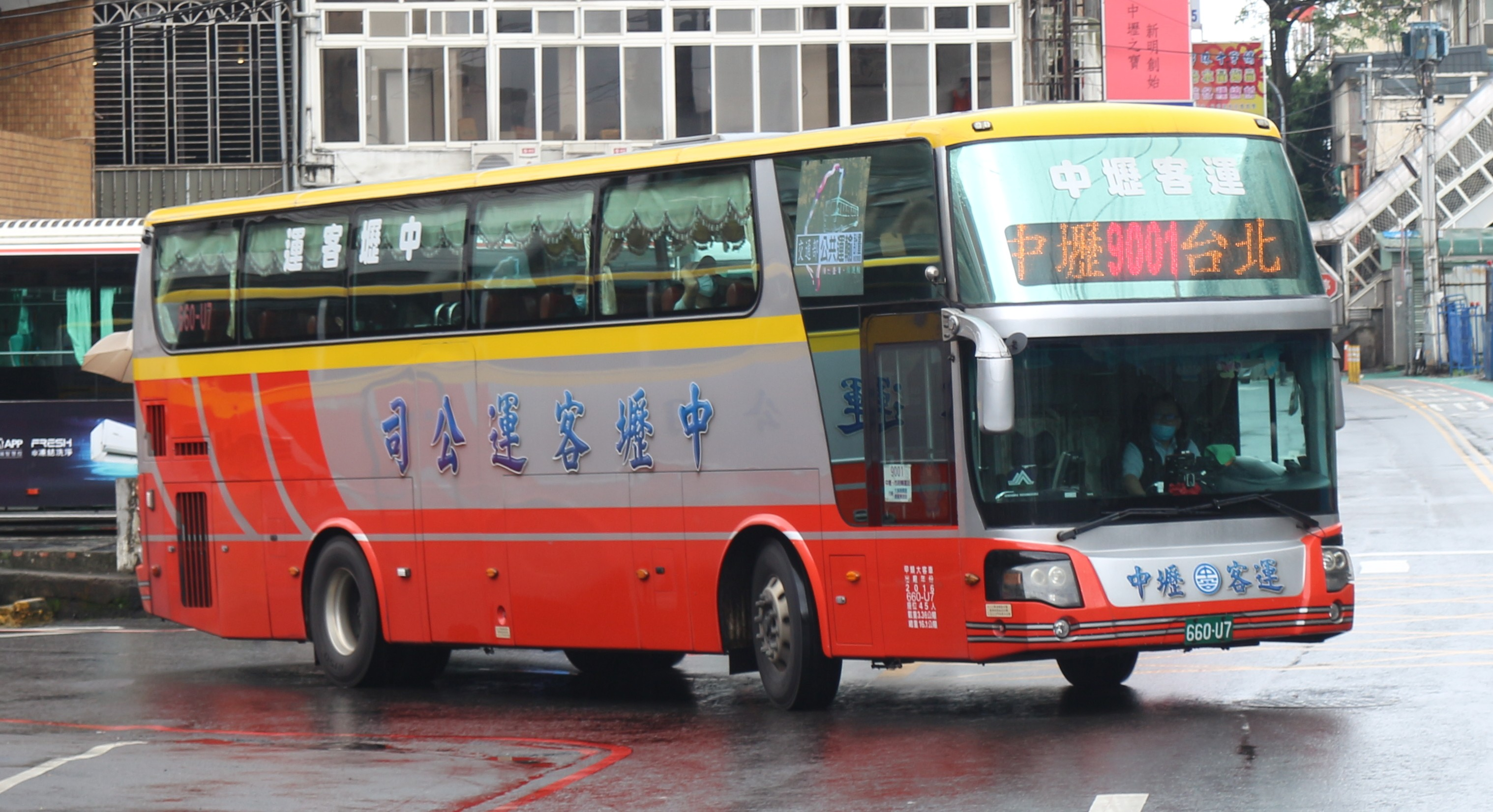 中壢客運 2016 Fuso RM11FN2XC 660-U7